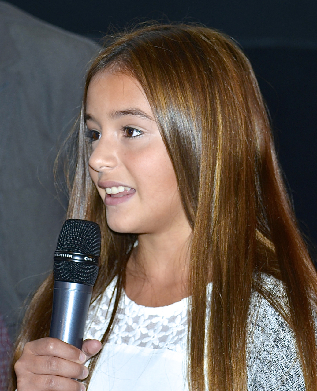 Lea Stojanov under presentationen av den Svenska filmhösten 2014 i Filmhuset i Stockholm den 18 augusti 2014.